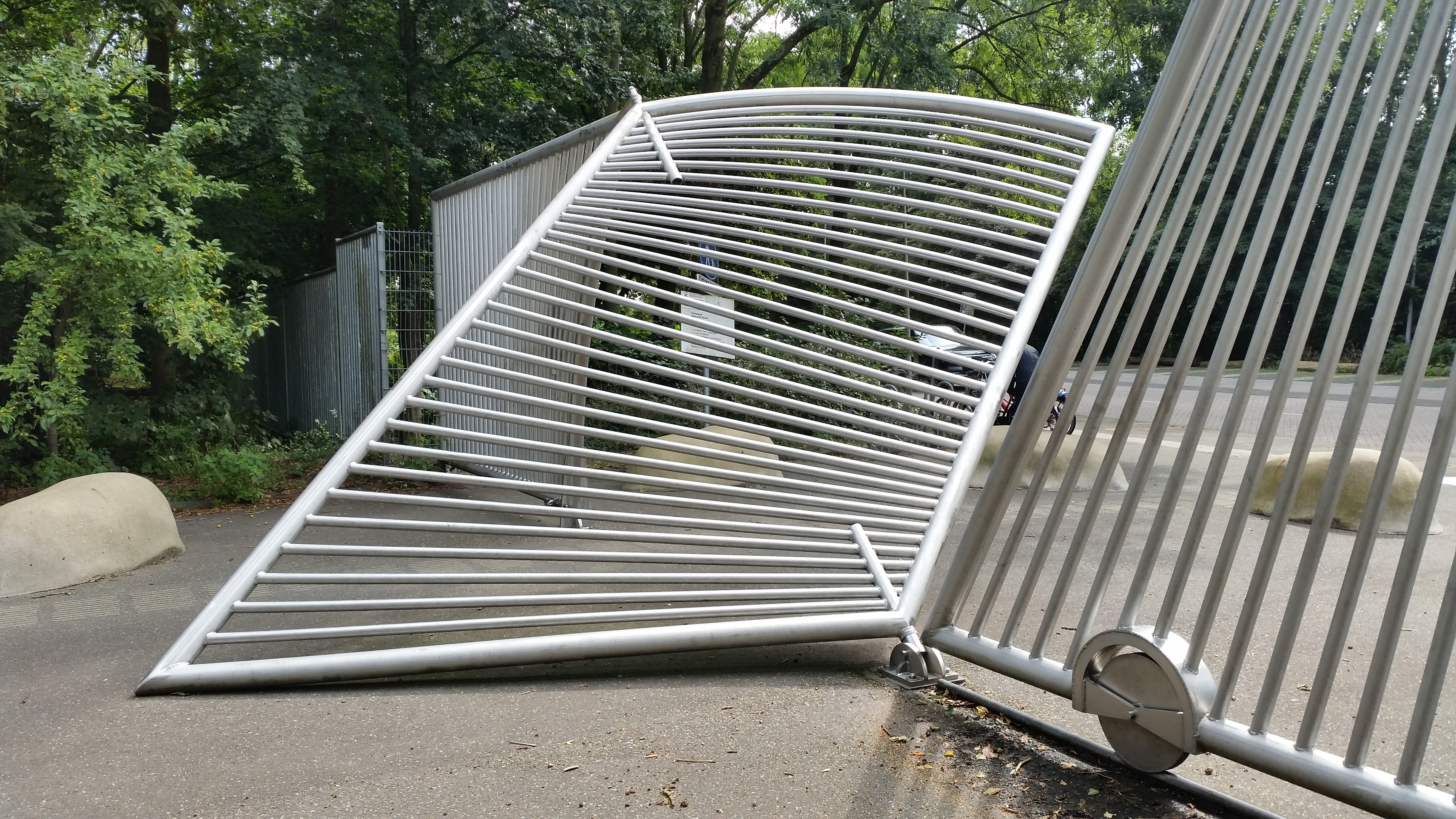 Poort in Entree De Borcht als klimrek